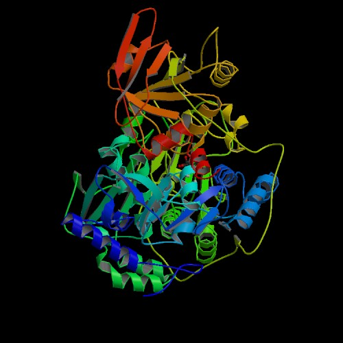 Recombinante aconitase enyme PDB code: 1AMI